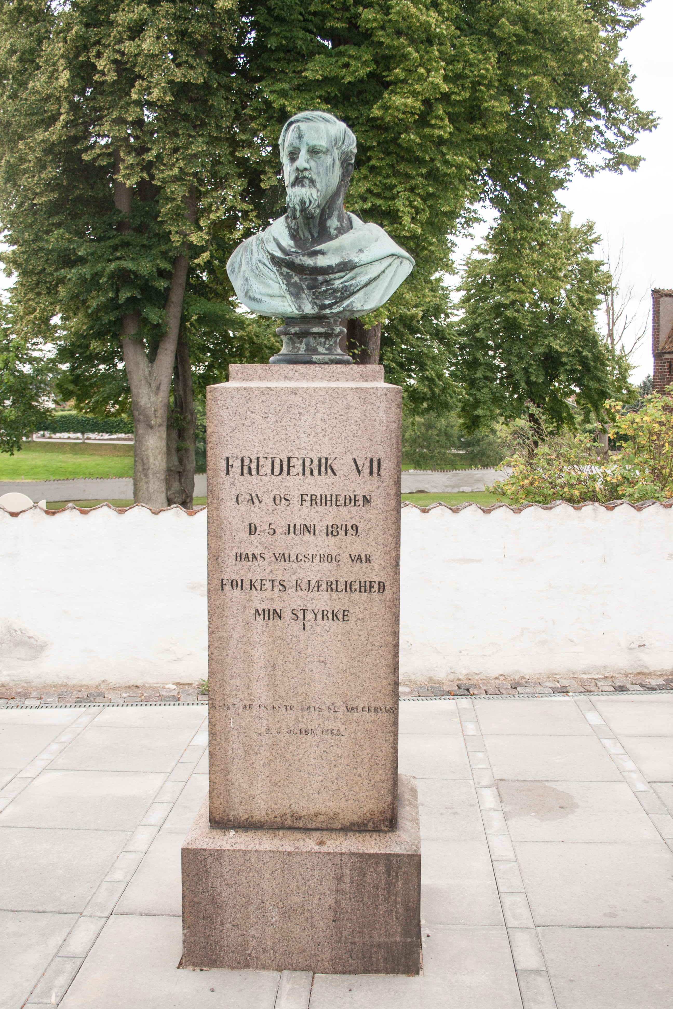 Vordingborg, bust of Frederik VII